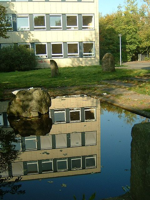 Ernst-Reuter Schule in Frankfurt Main, Artikel siehe , selbst fotografiert am 12.10.2005--Peng 09:18, 13 October 2005 (UTC)